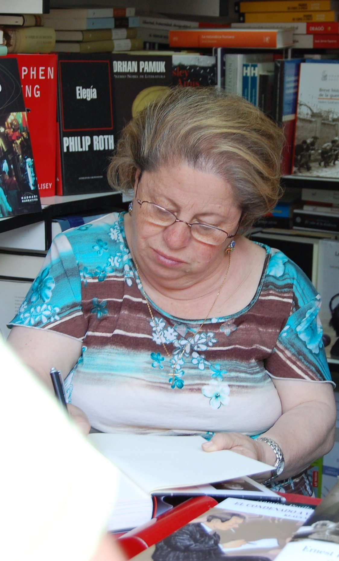 La periodista Maria Antonia Iglesias firmando en la Feria del libro de Madrid, junio de 2007.